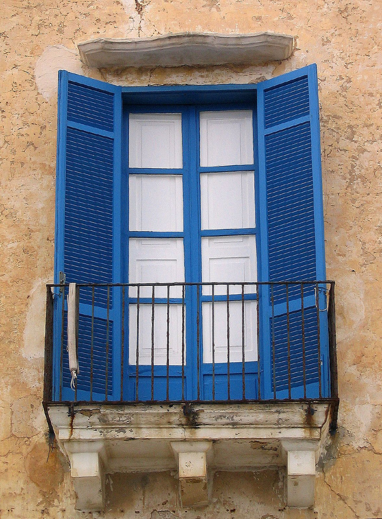 Gallipoli, Puglia, Italia